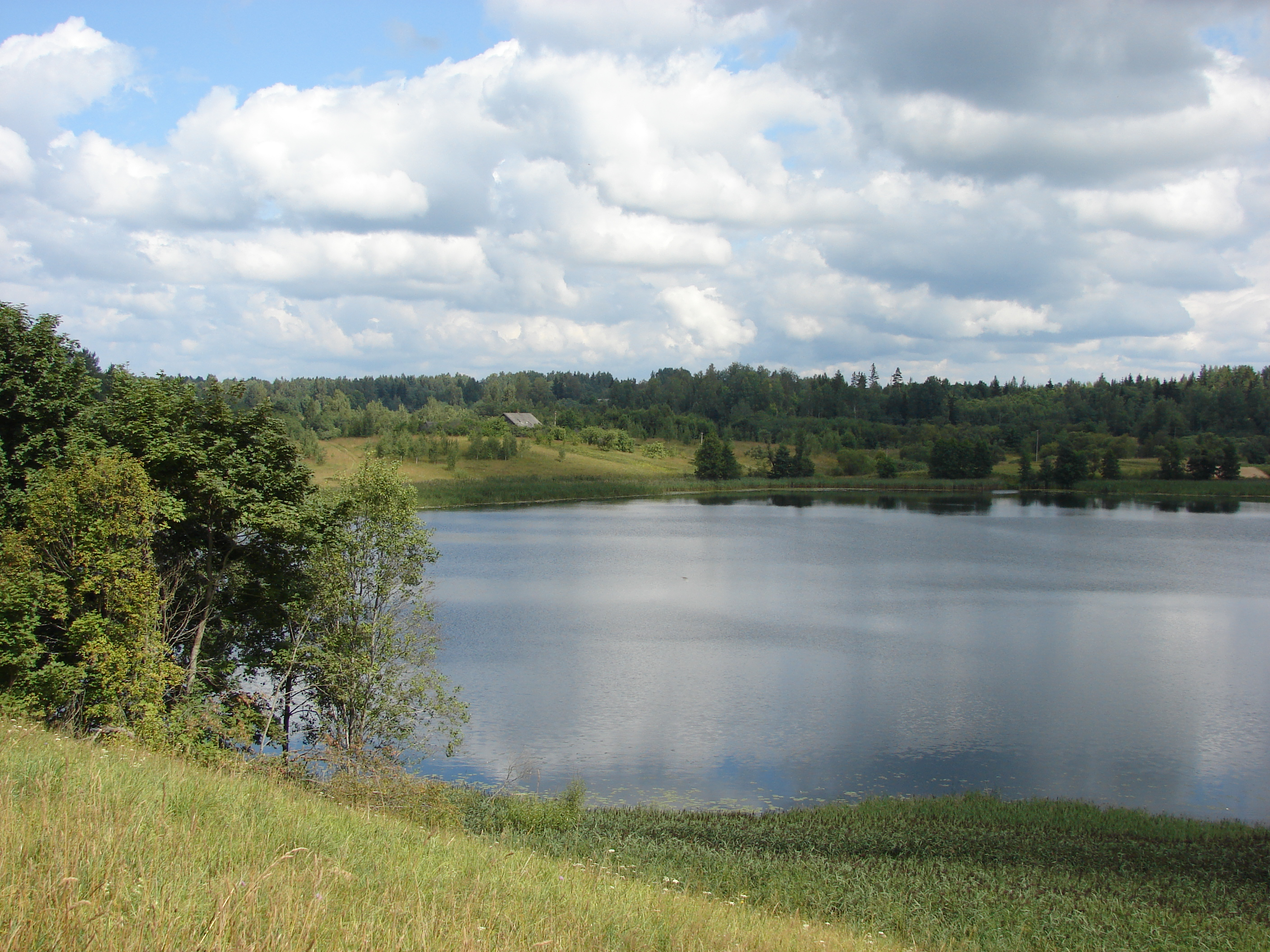 Pakalnu ezers